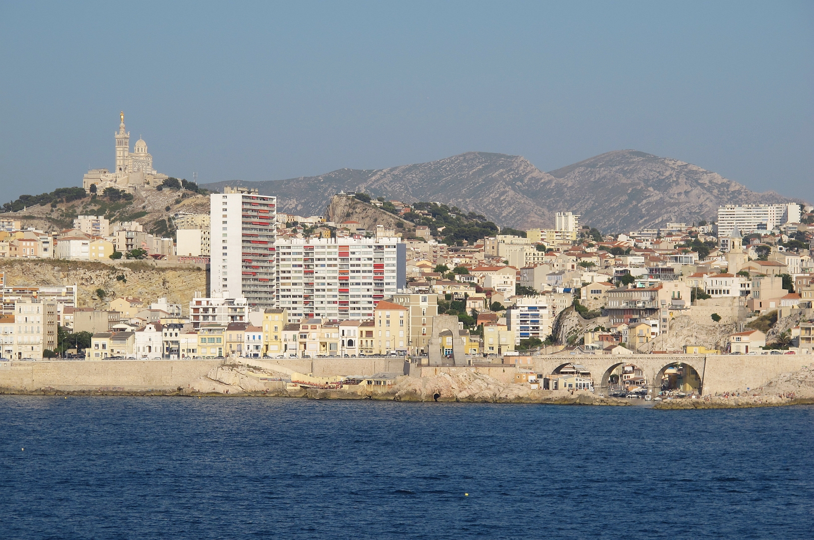 Notre Dame de la Garde et le Vallon des Auffes vus depuis la mer le 18 juillet 2015.